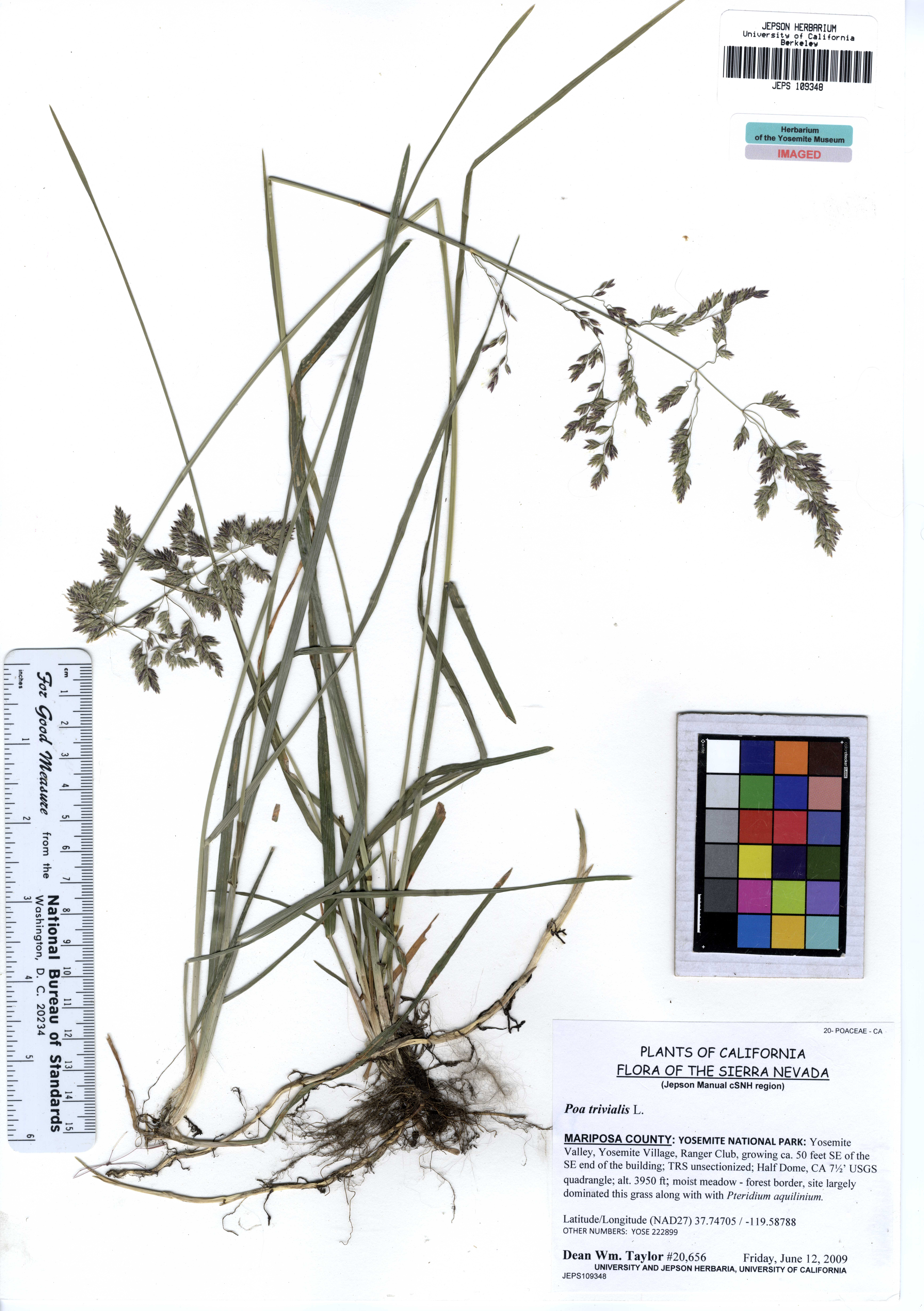 JEPS109348 Poa trivialis